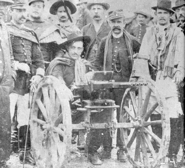 Candido Dulcídio Pereira, Revolução Federalista - 1893/4. Lapa, Paraná - Brasil.